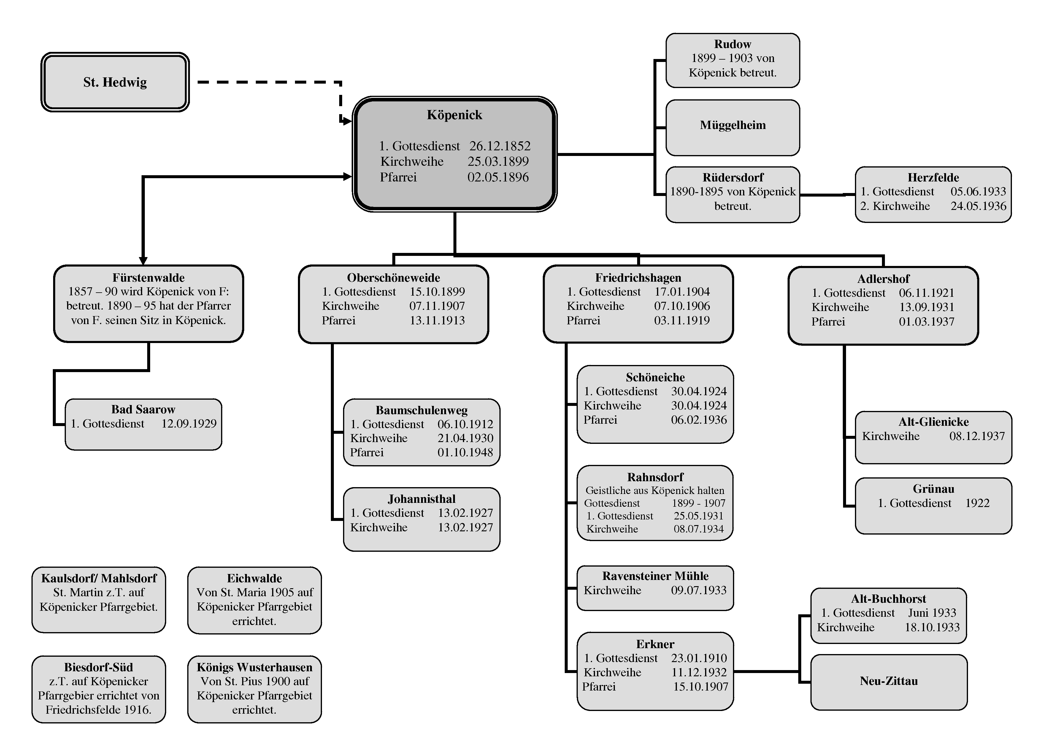 Übersicht St. Joseph Berlin-Köpenick als Mutterkirche für Umgebung